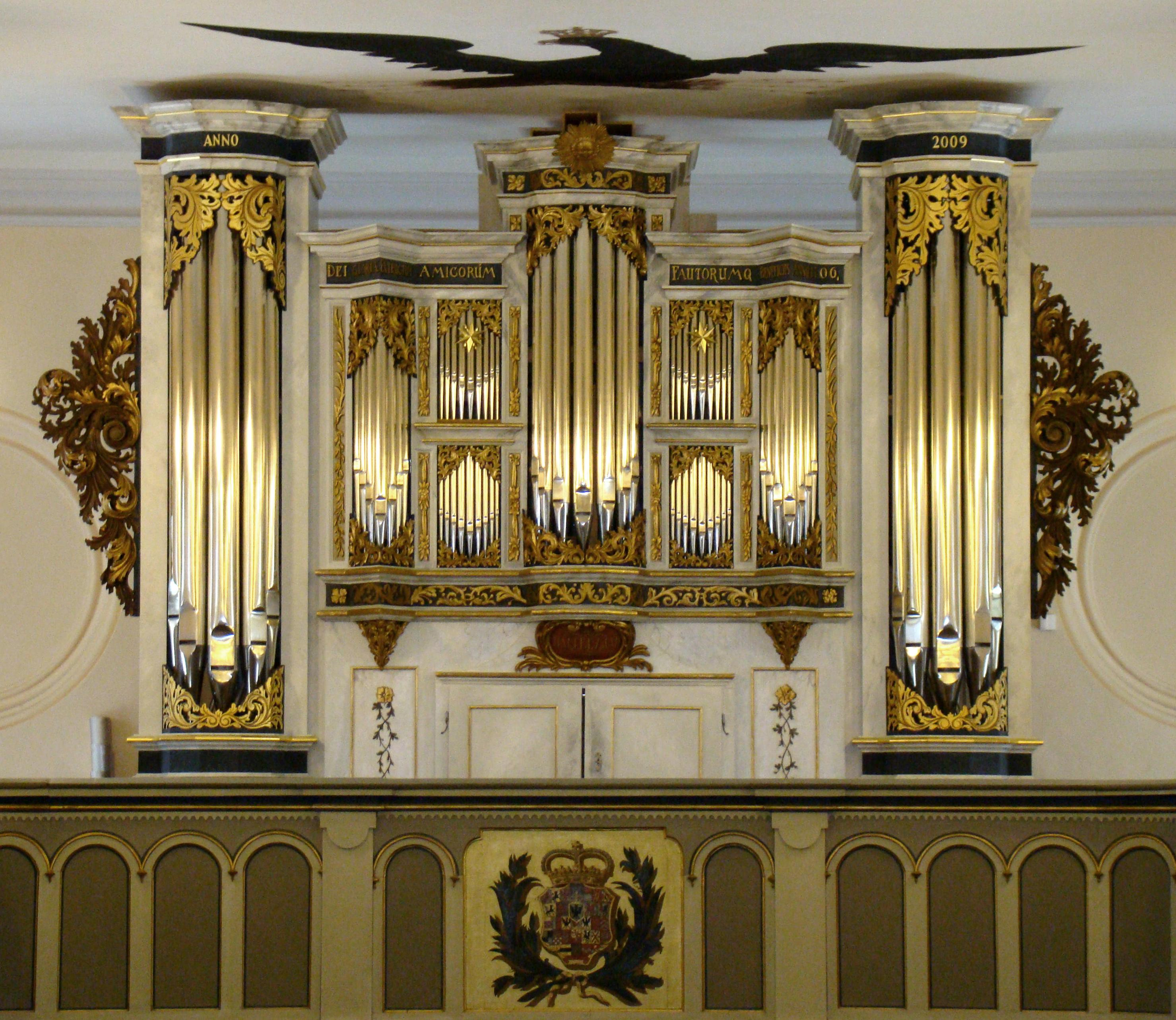 Ahrend-Orgel in Königs Wusterhausen